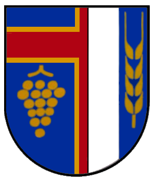 Wappen von Urbar (Rhein-Hunsrück-Kreis)